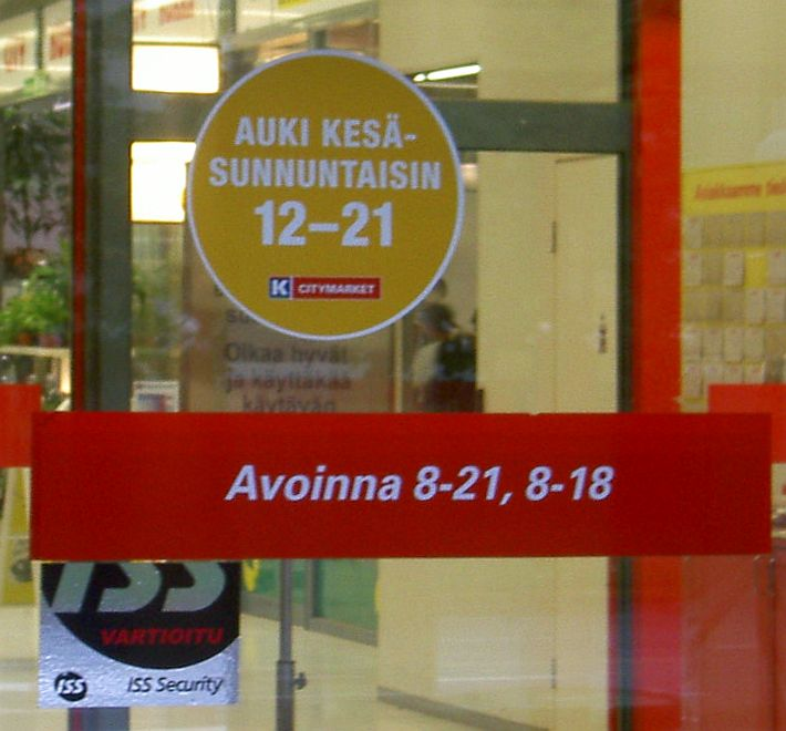 Ladenöffnungszeiten in Finnland